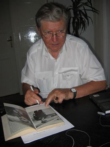 Henryk Landsberg (b. 1932), Polish pilot